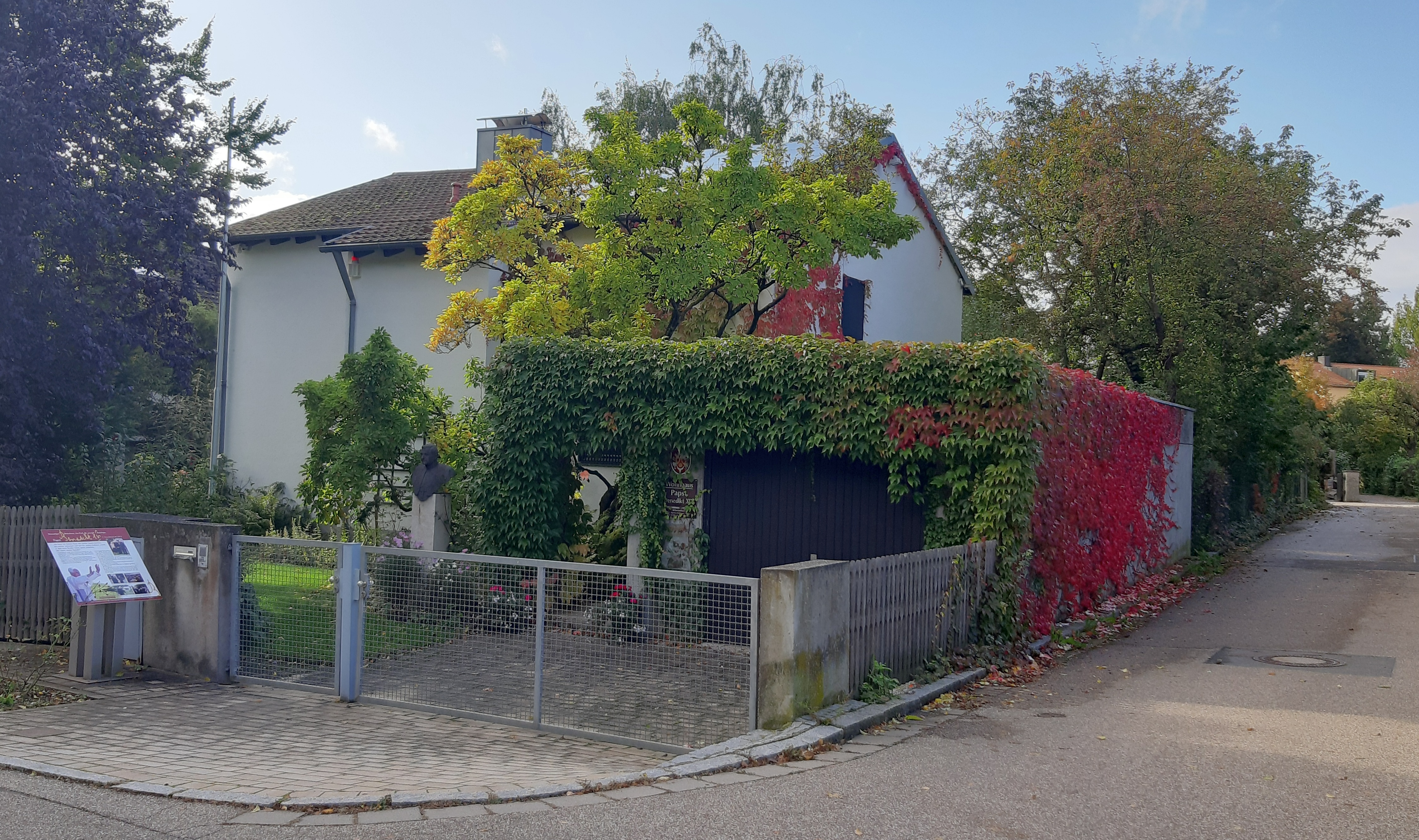 Das ehemalige Wohnhaus von Prof. Dr. Joseph Ratzinger, dem späteren Papst Benedikt XVI. in der Bergstraße 6, 93080 Pentling. Seit 2010 im Besitz der Stiftung Papst Benedikt XVI. Seit 2012 Ort der Begegnung und Dokumentation.